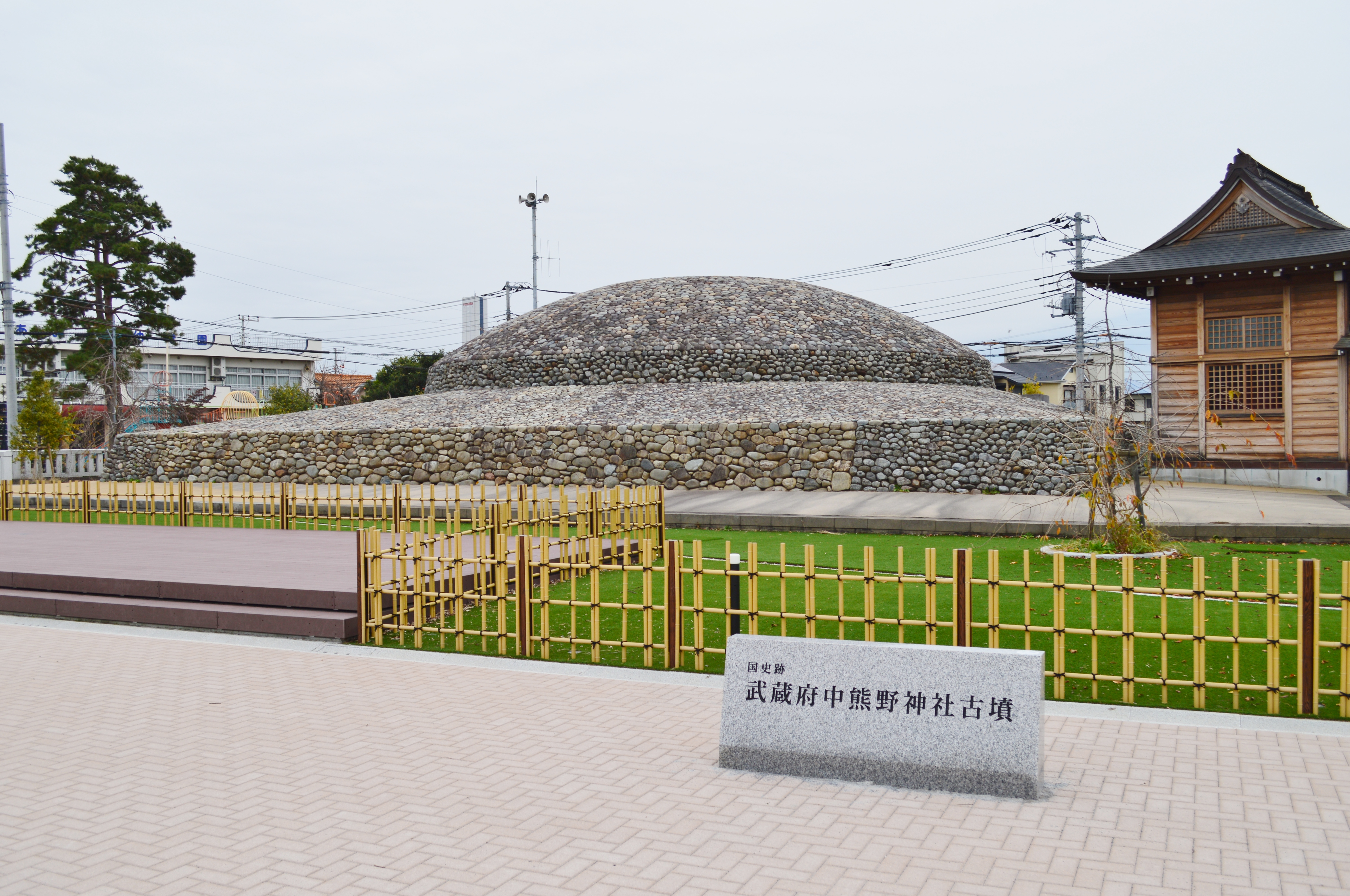 武蔵府中熊野神社古墳 墳丘